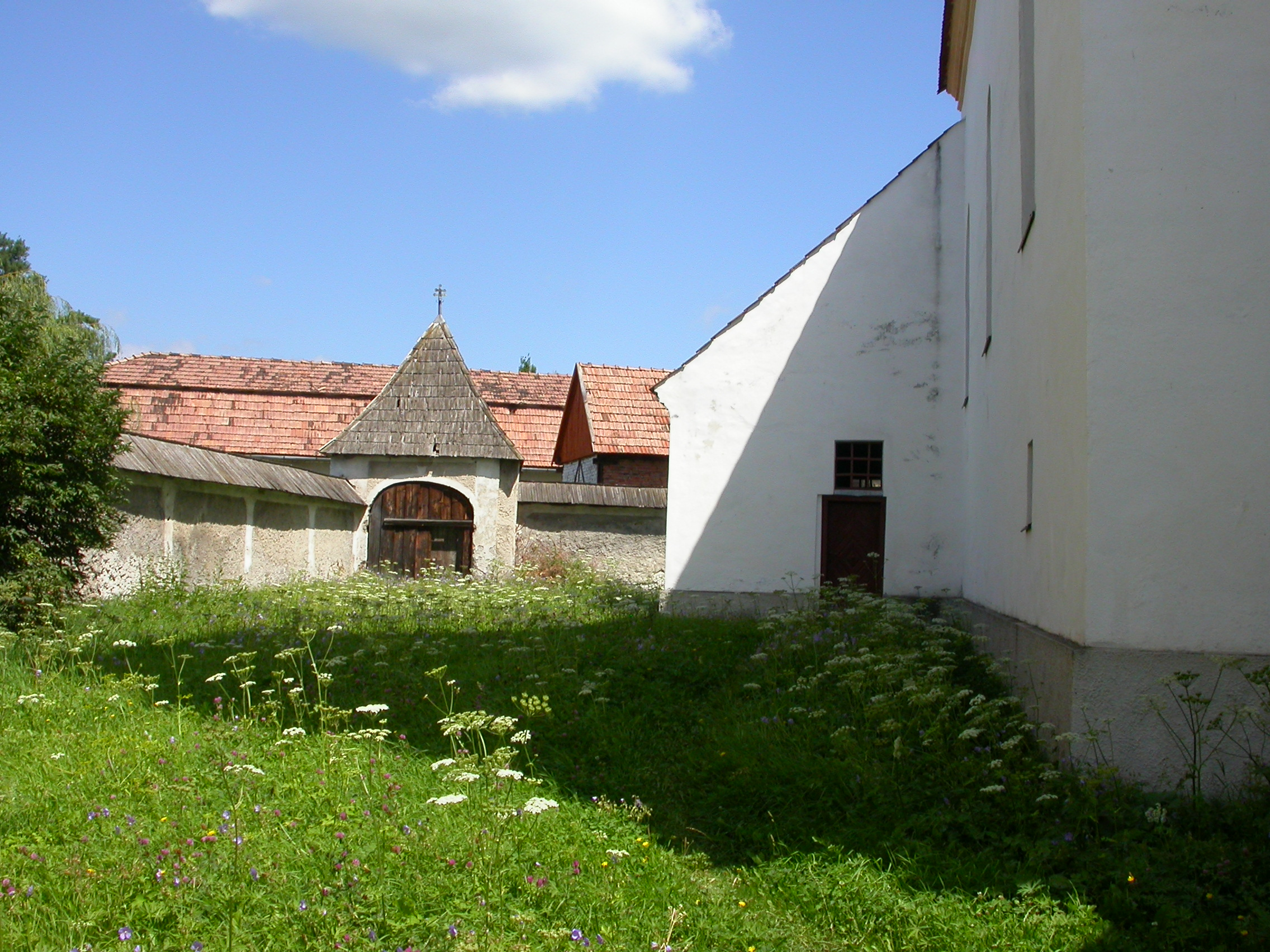 Ansamblul bisericii romano-catolice "Sf. Ecaterina", 1750-1800